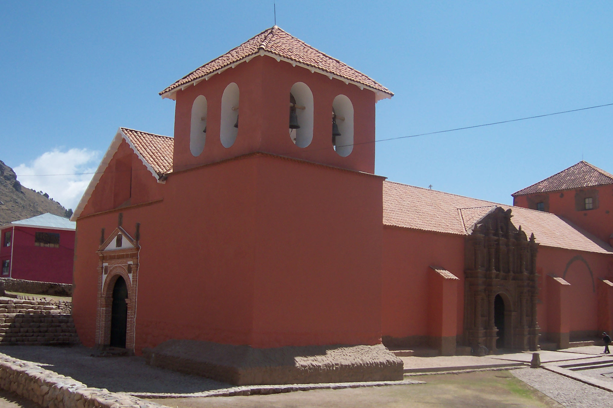 Juli. San Juan de Latran, exterior 1 Autor: Alfredobi Fecha: Agosto 2006